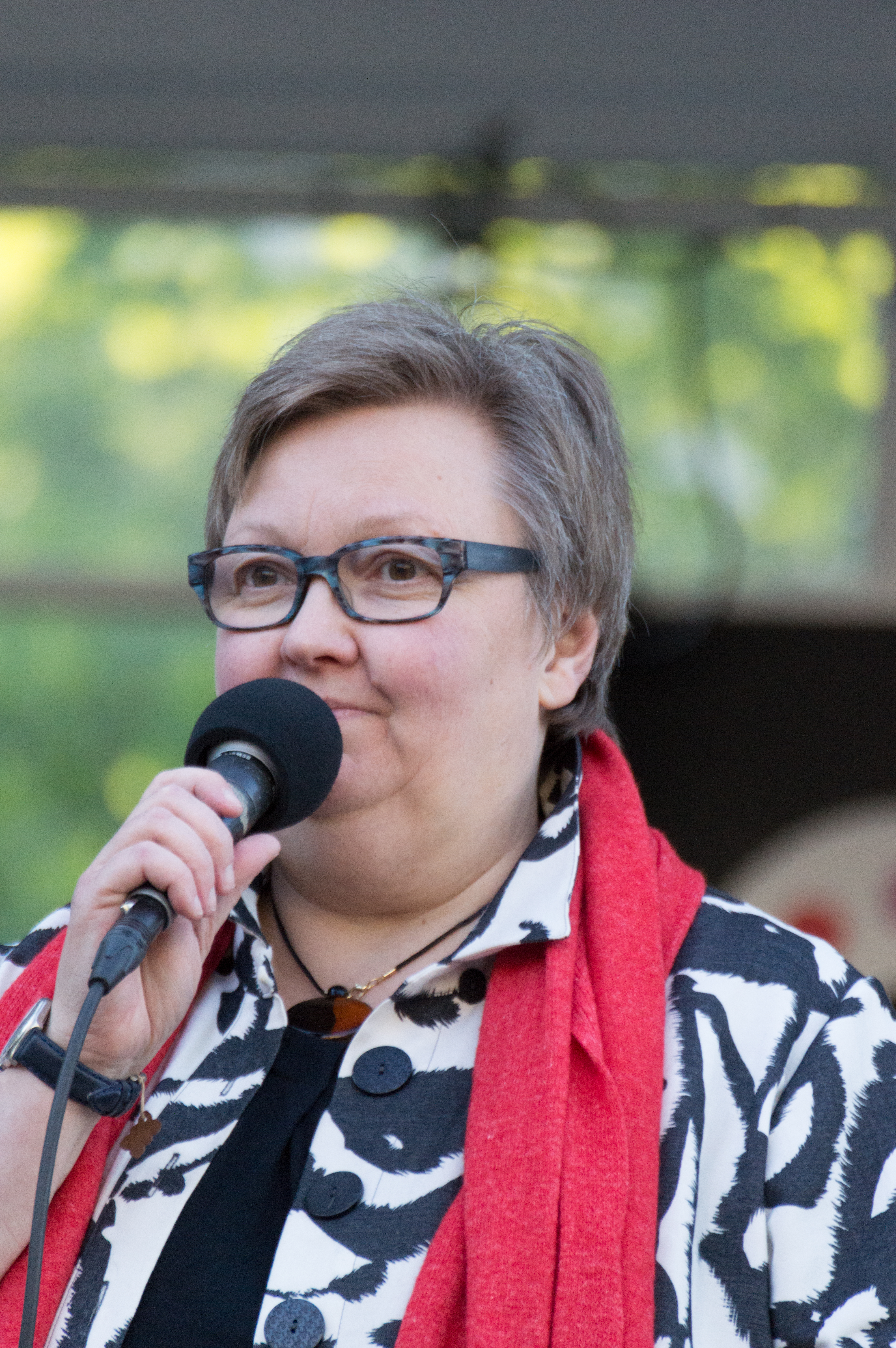 Laura Jurkka suomalainen näyttelijä